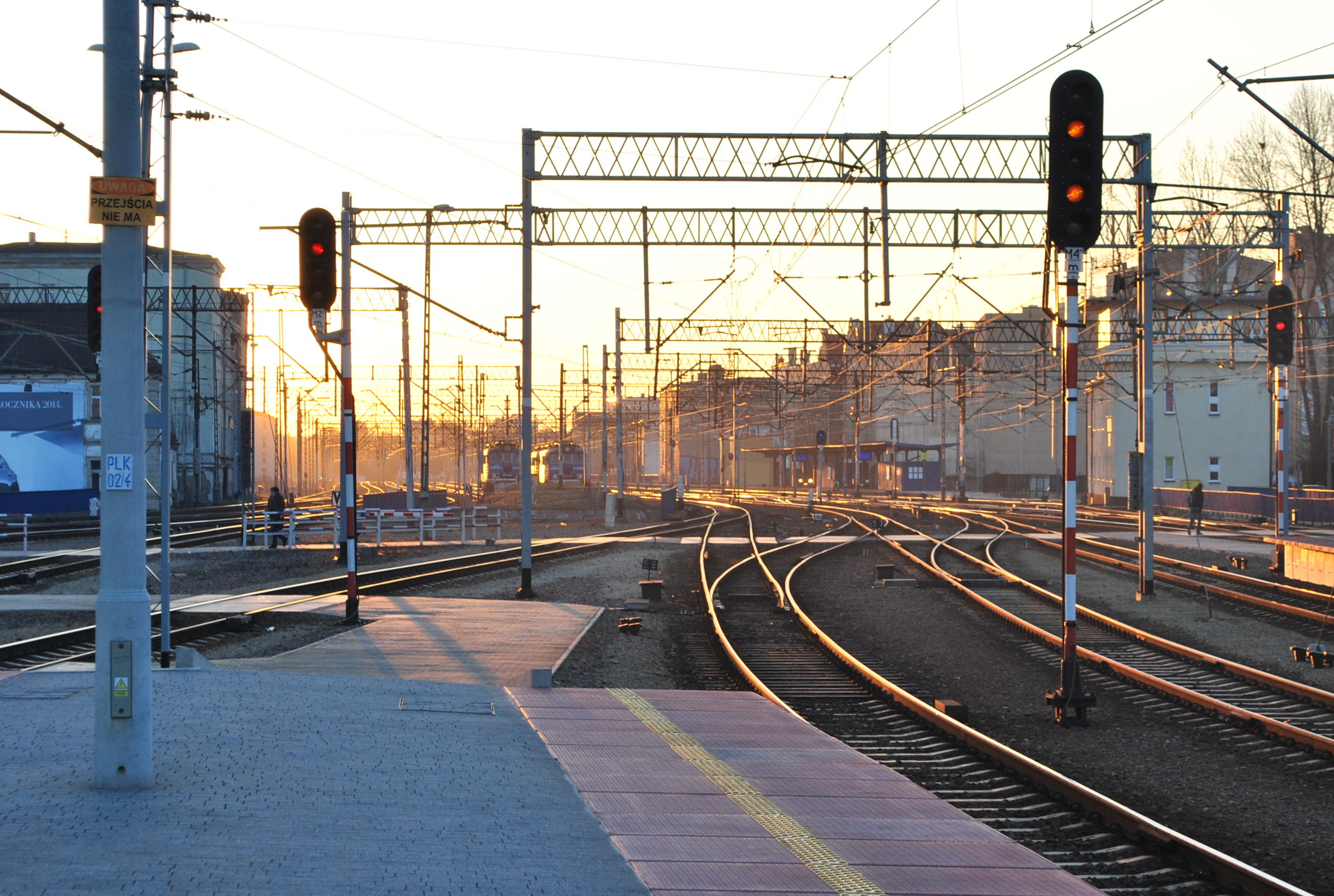 Stacja kolejowa Katowice. Tory w kierunku stacji Katowice Zawodzie